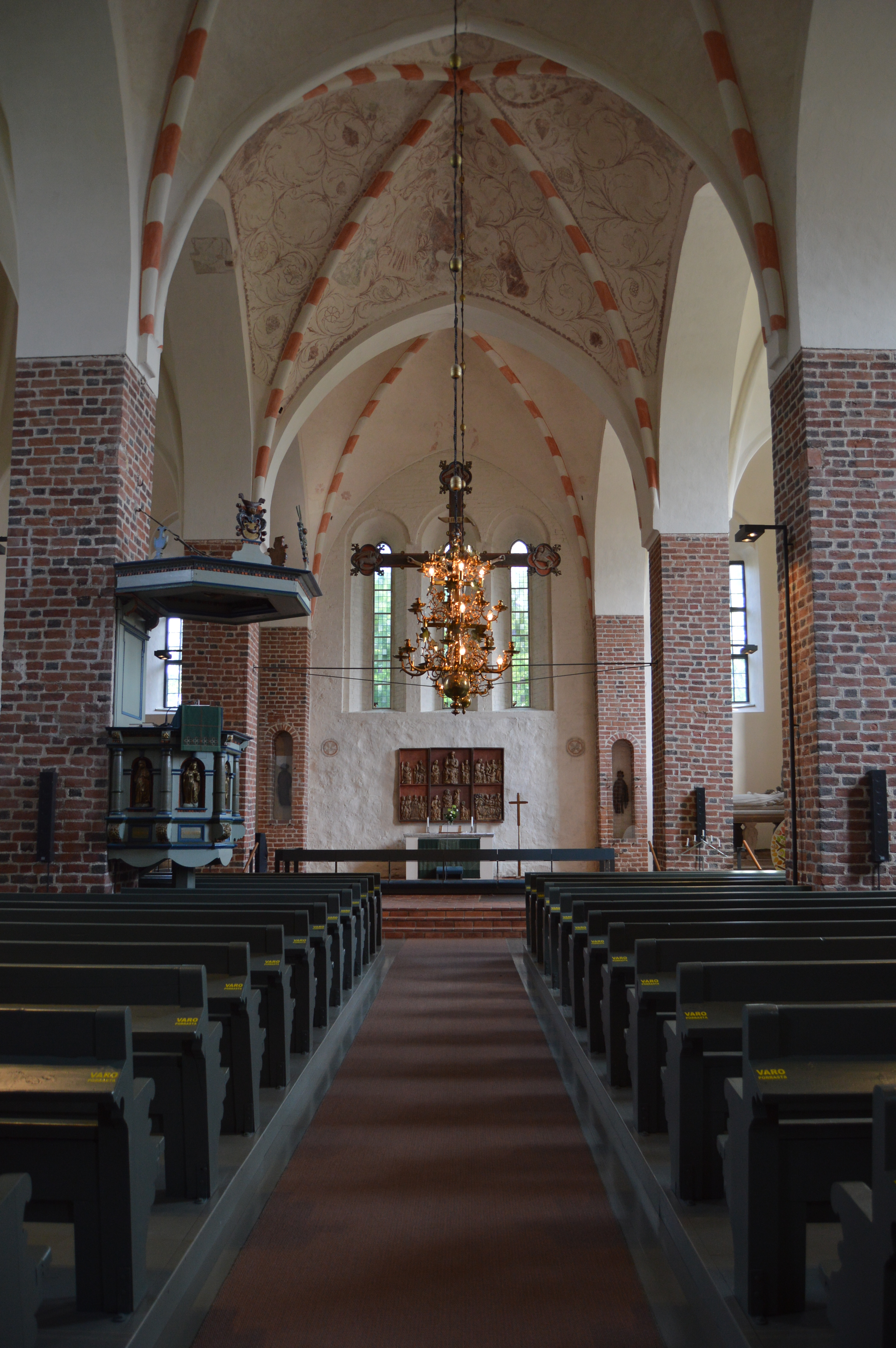 Mynämäen kirkko sisältä